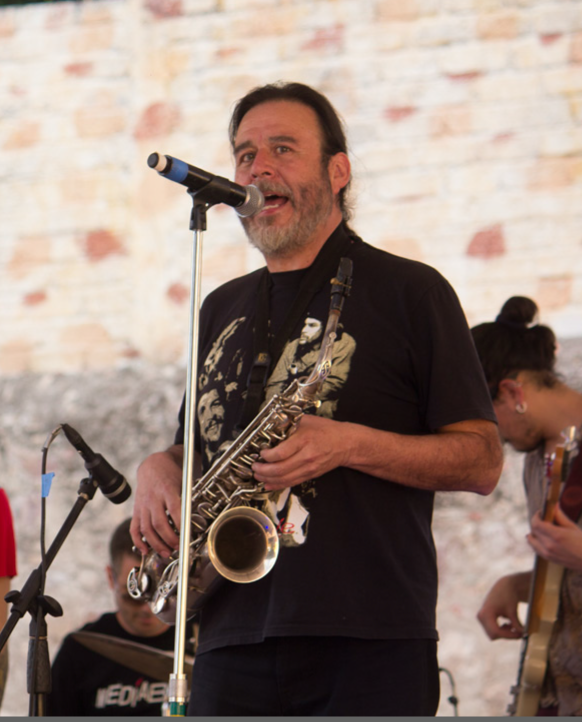 Cristián Crisosto en el FestivAlterNativo de Querétaro, México en el 2017, junto a MediaBanda